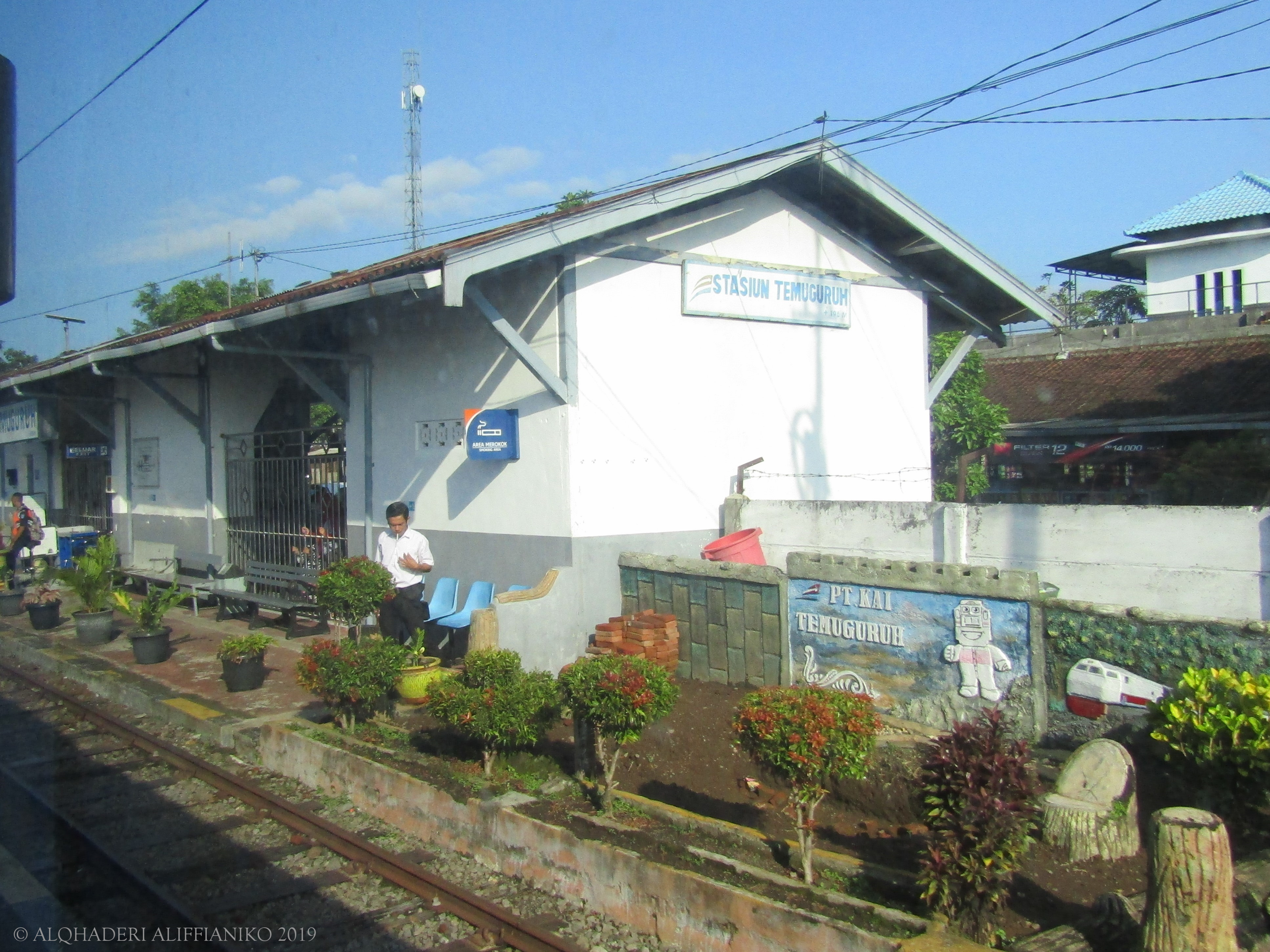 Stasiun Temuguruh, dilihat dari peron